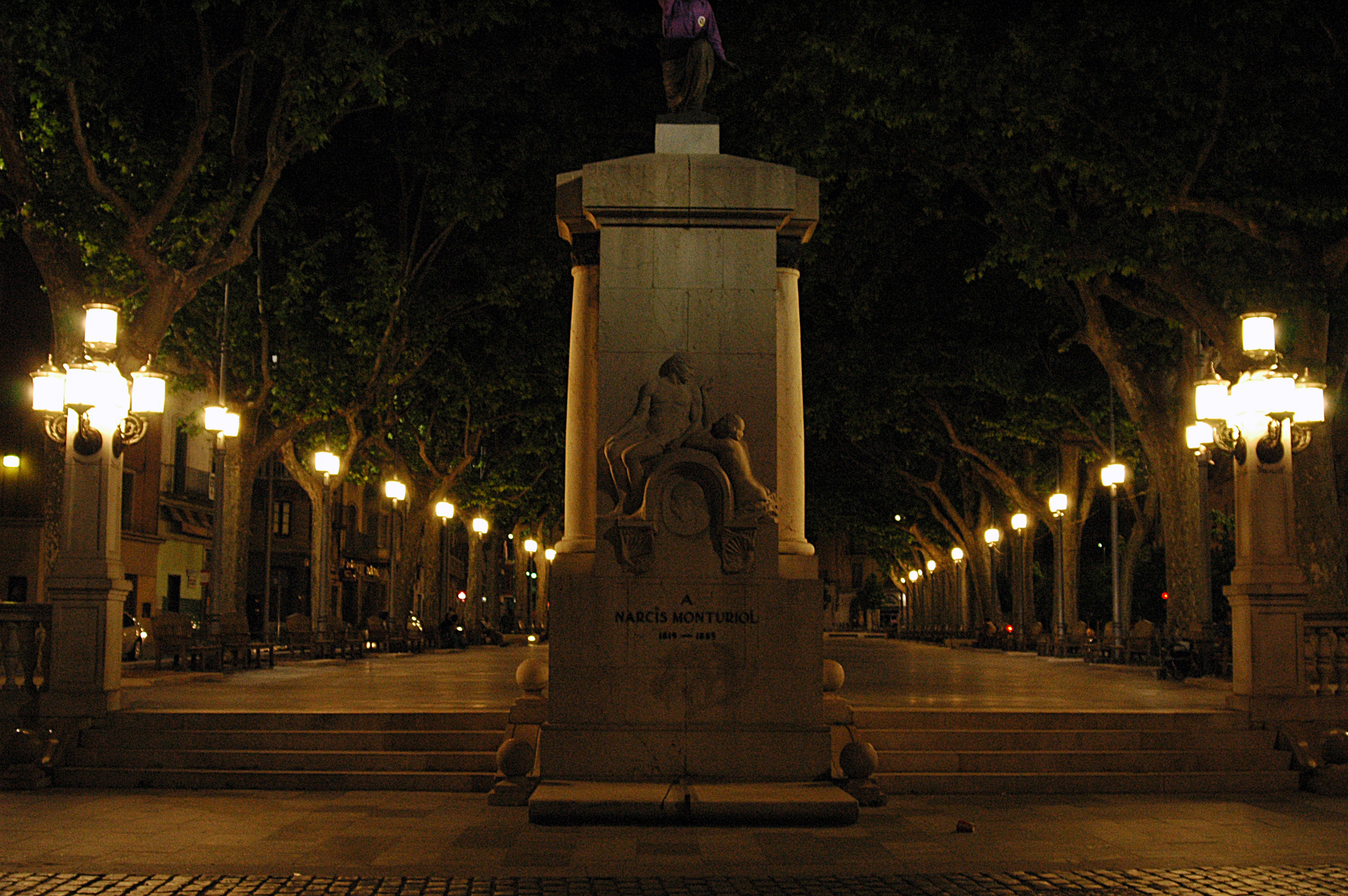 Rbla. Sara Jordà (Figueres)